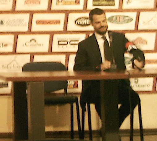 Marco Mezzaroma, intervistato il 25 aprile 2015 dopo la matematica promozione ottenuta dalla Salernitana